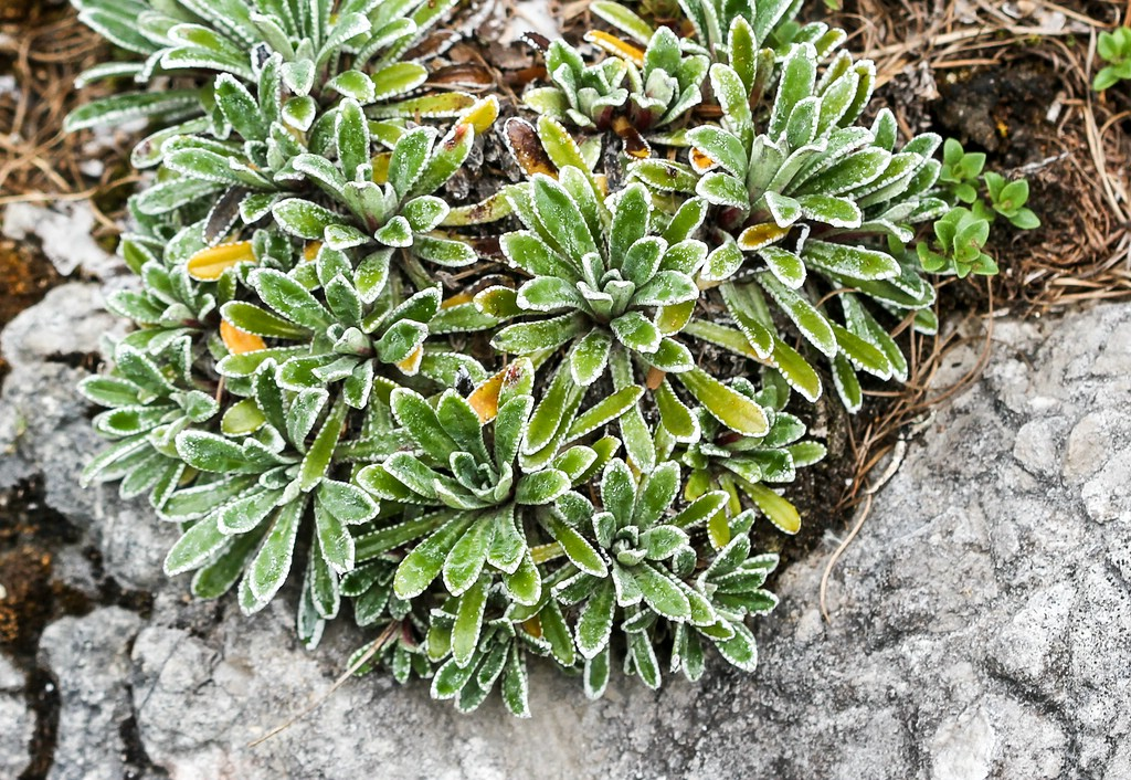 Alpengarten Villacher Alpe: Krusten-Steinbrech